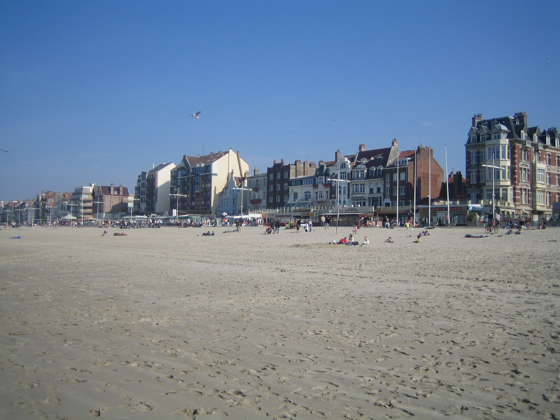 Dunkerque.